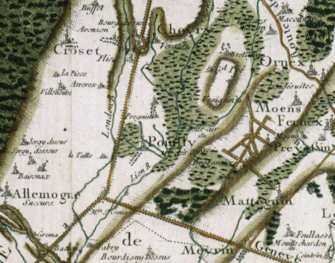 Cassini Geneva Sheet Extract